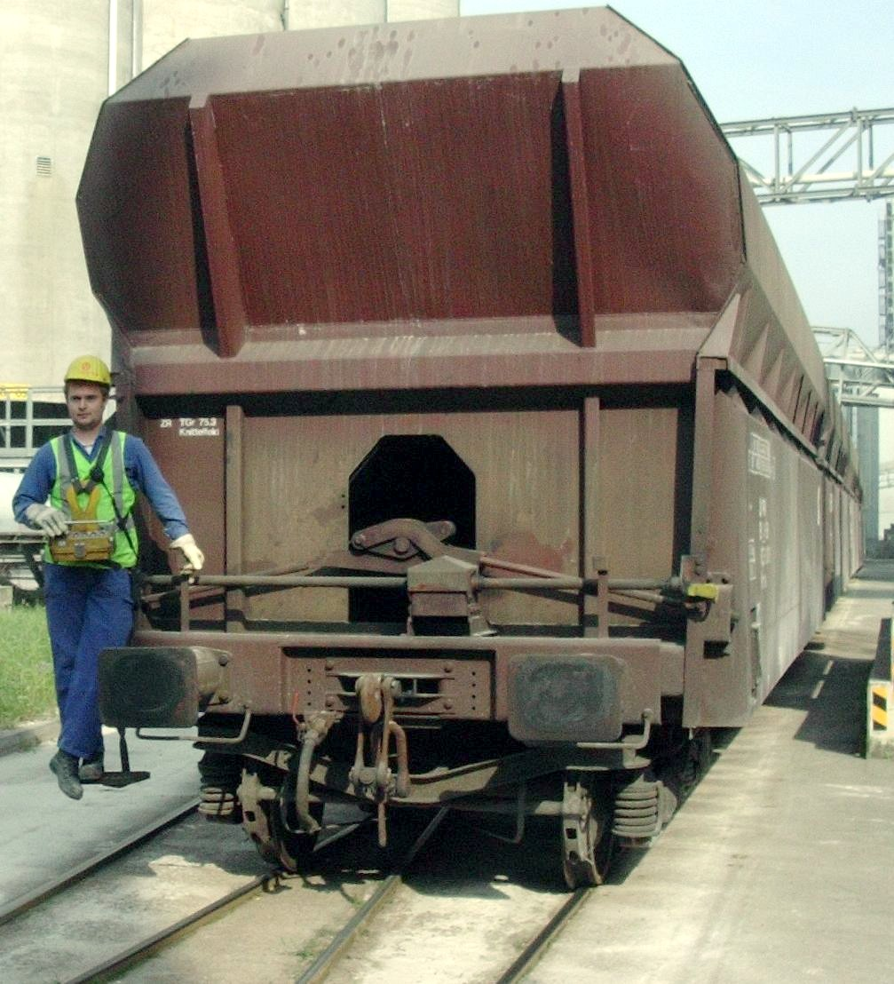 Rangierer - Werksbahn der Hans Hatschek AG